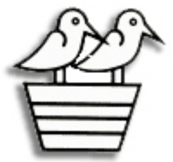 Jeroglífico del municipio de Chicoloapan